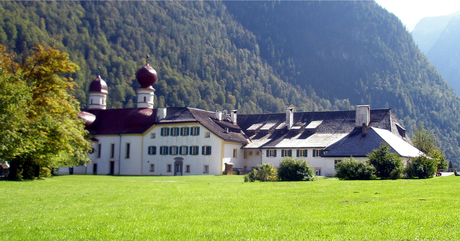 St. Bartholomä, Ensemble mit ehemaligem Jagdschloss